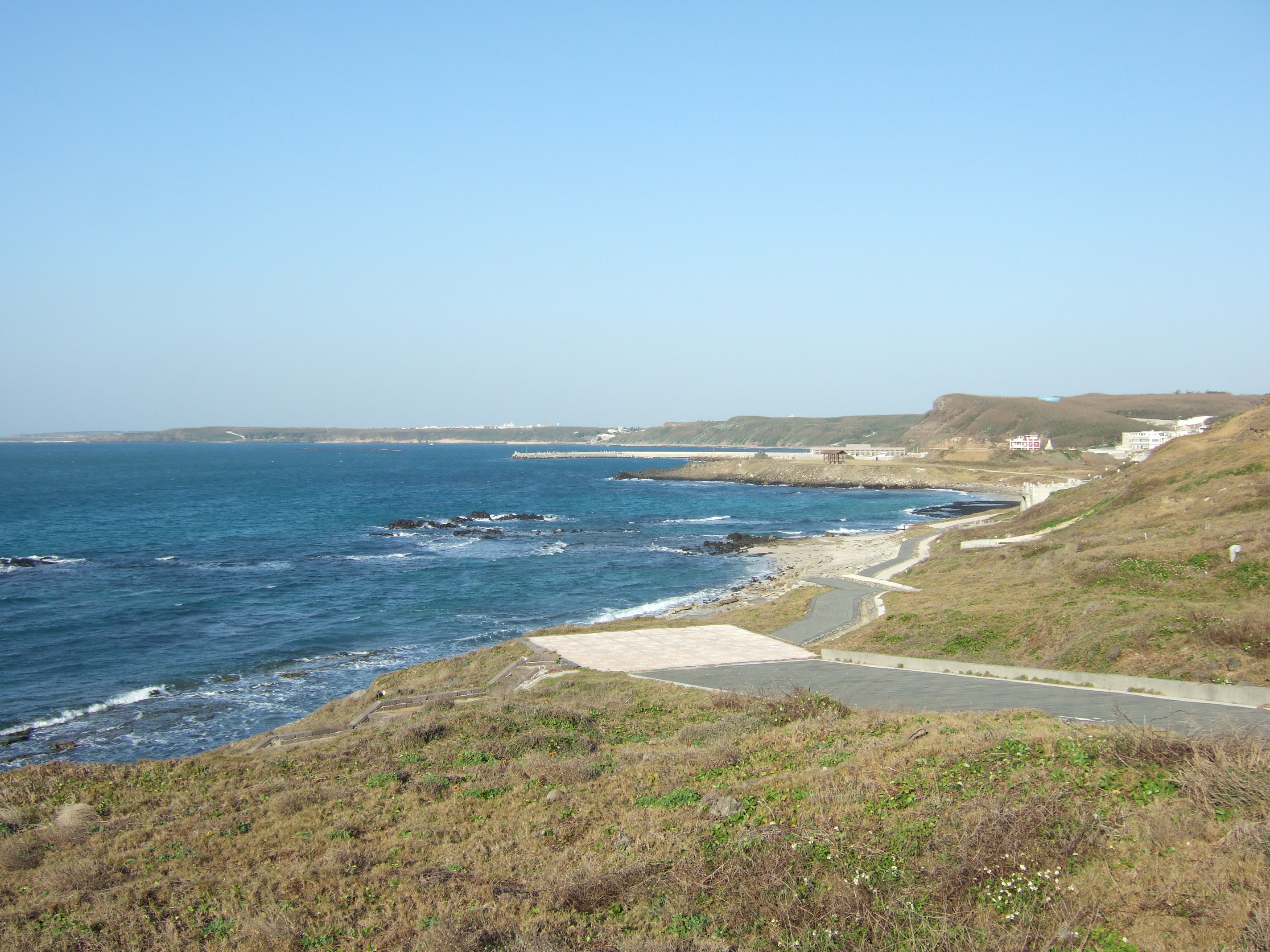 內垵遊憩區